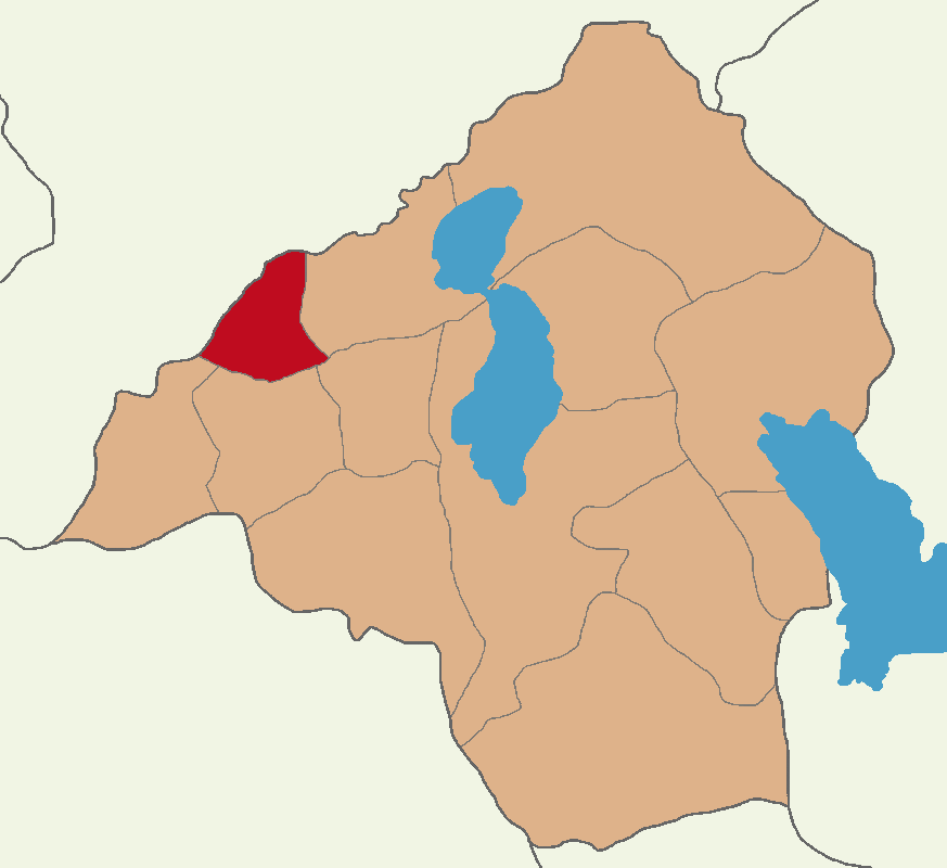 Uluborlu ilçesinin konumu